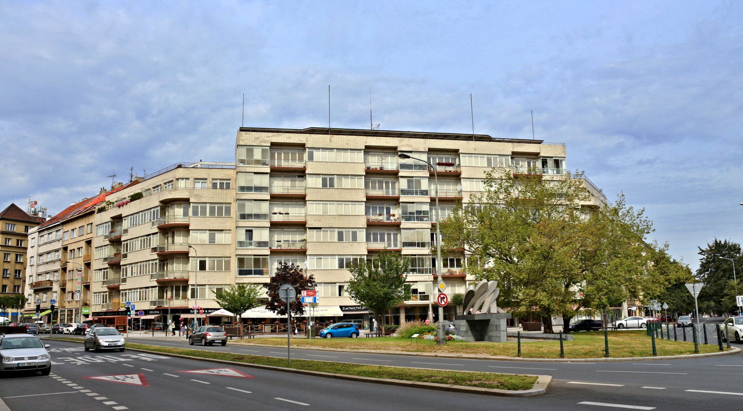 Skleněný palác (Bubeneč)